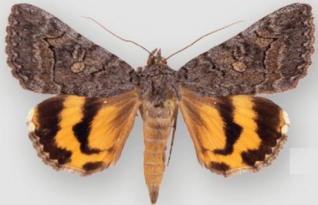 Catocala chelidonia chelidonia